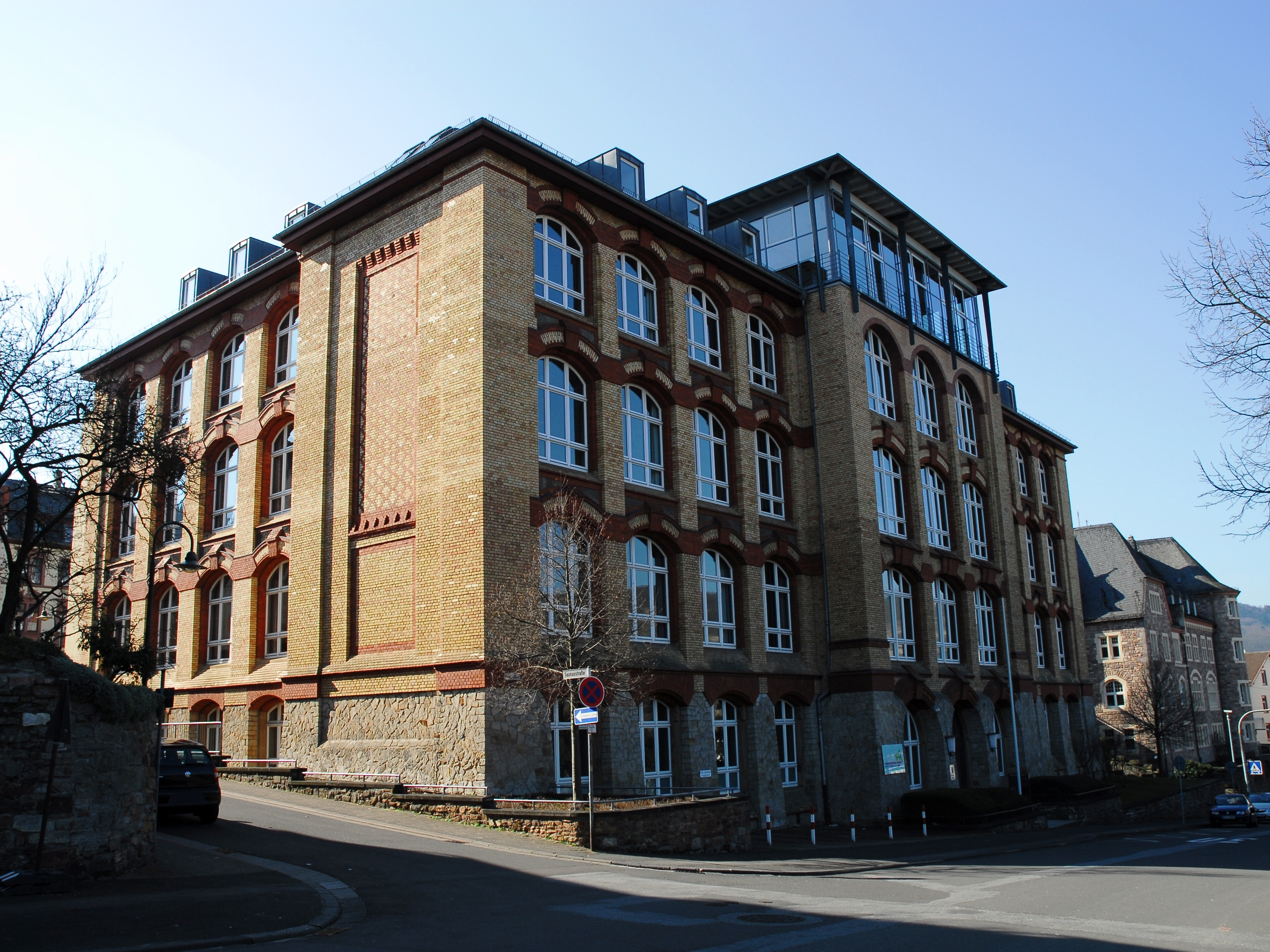 Fachhochschule in Bingen am Rhein, Rochusallee 4ː ehemaliges Rheinisches Technikum; Dreiflügelanlage; viergeschossiger spätgründerzeitlicher Klinkerbau, 1898, Architekten wohl Paul Koch und Hermann Hoepke. Ansicht von Osten.